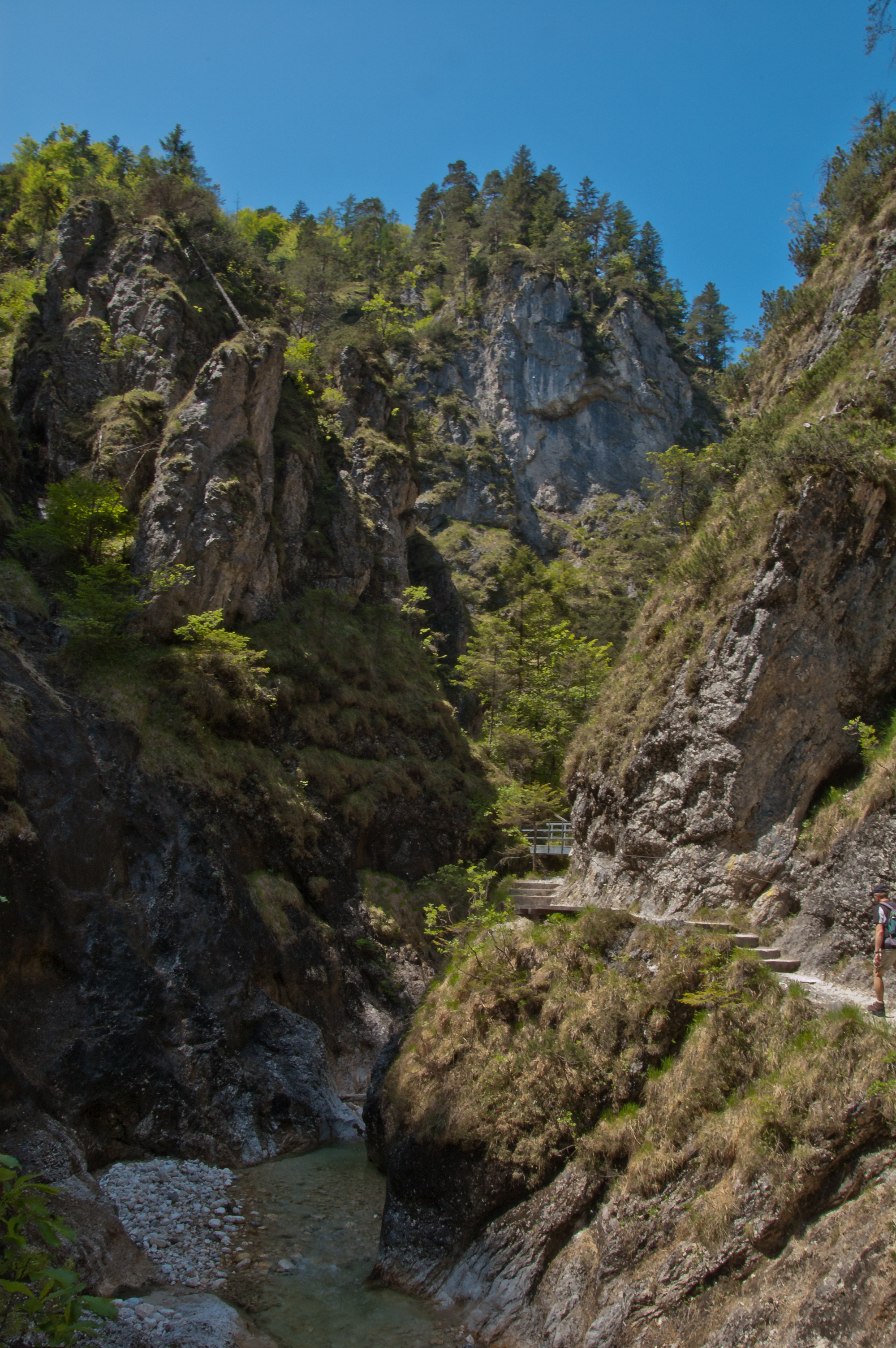 Im mittleren Teil der Almbachklamm, Blick bachaufwärts